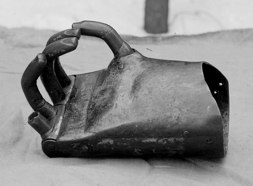 Ältere Eiserne Hand des Ritters Götz von Berlichingen, um 1510, Museum der Burg Jagsthausen. Glasnegativ von Wilhelm Kratt (1887–1968).